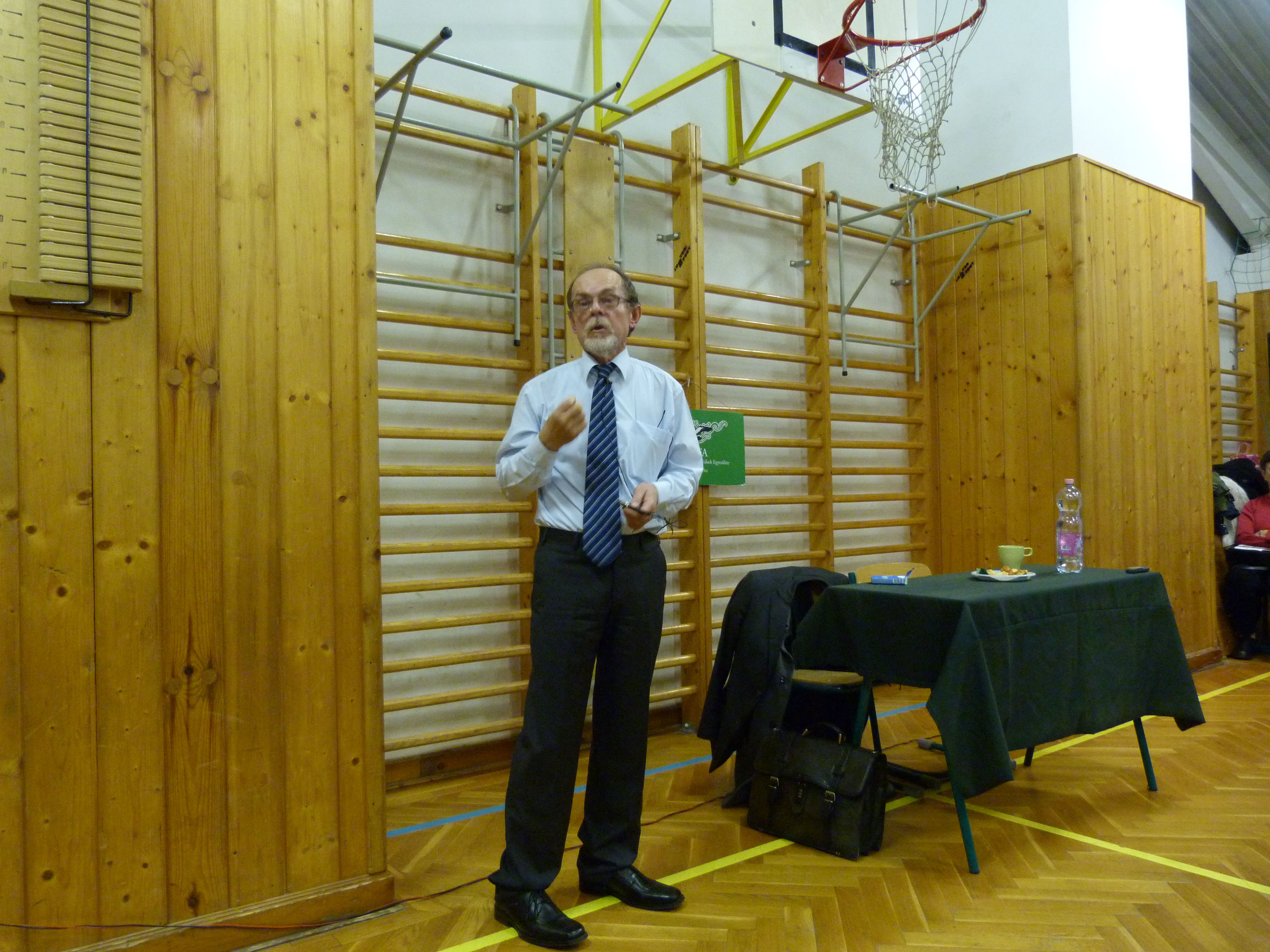 A felvétel 2012. november hó 28 -án, szerdán készült. Bogár László tanár út a Sashegyen, a Farkasréti Esték sorozat keretében tartott előadást a SASFA Sasadi és Farkasréti Öregdiákok Egyesülete) összejövetelén. A Farkasréti Általános Iskola Budapest XI.ker Érdi út 2 szám. Források: sasfa.hu, facebook: sashegy-vedo.hu, Sasfa Egyesület: mobil: +36 70 280 4089